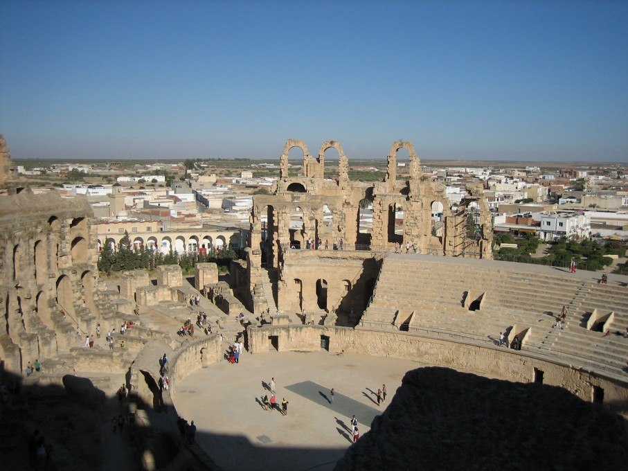 エル・ジェムの円形劇場